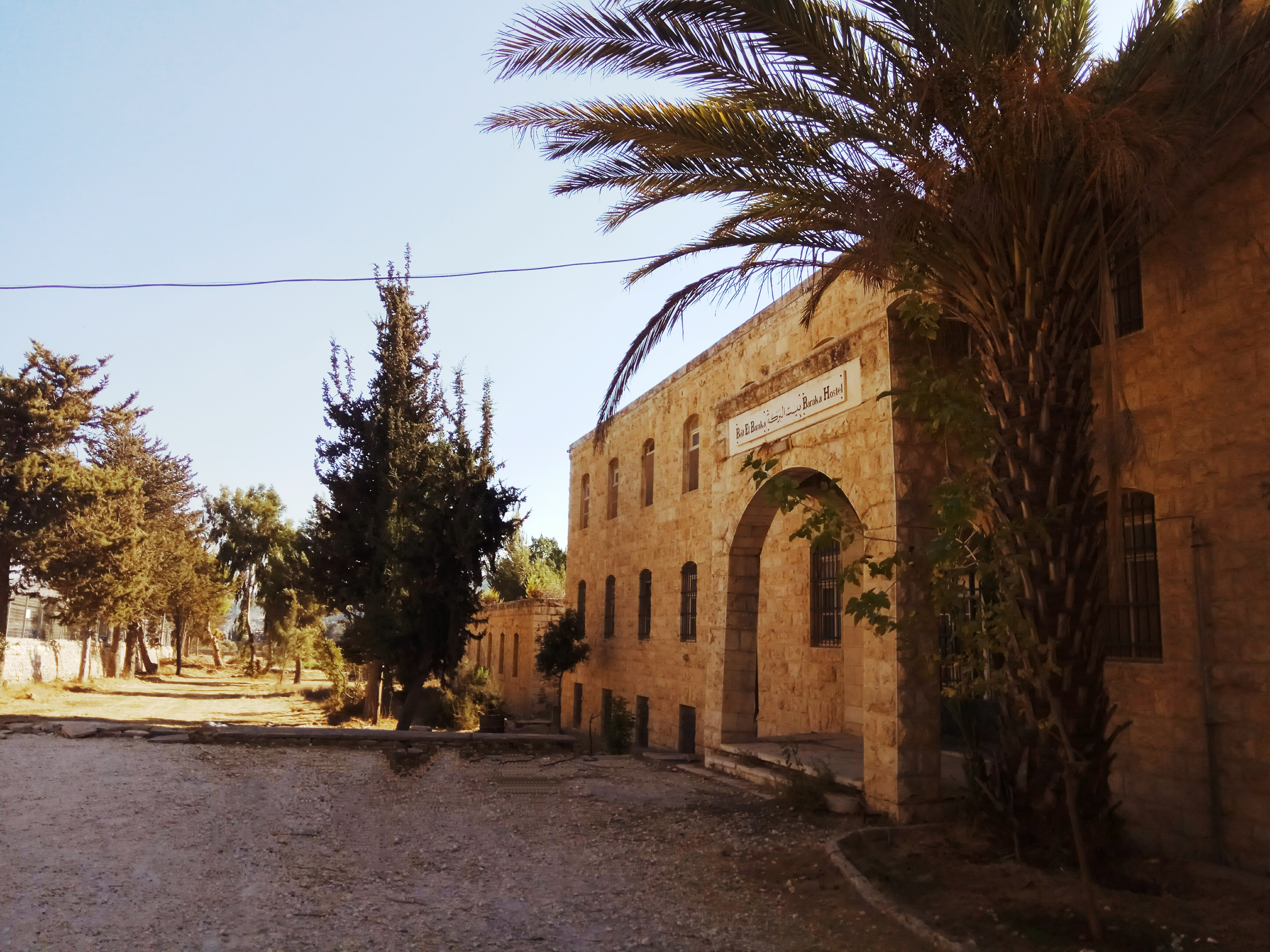 בית הברכה